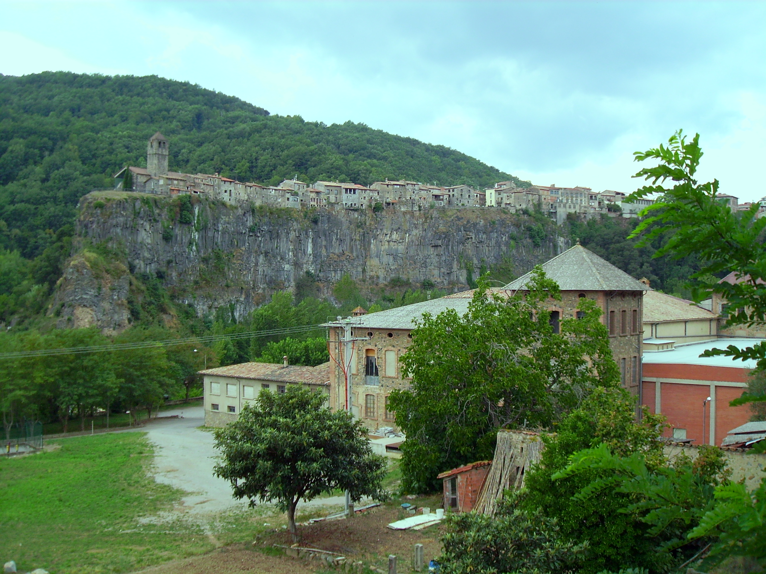 Panorama di Castellfolit de la Roca